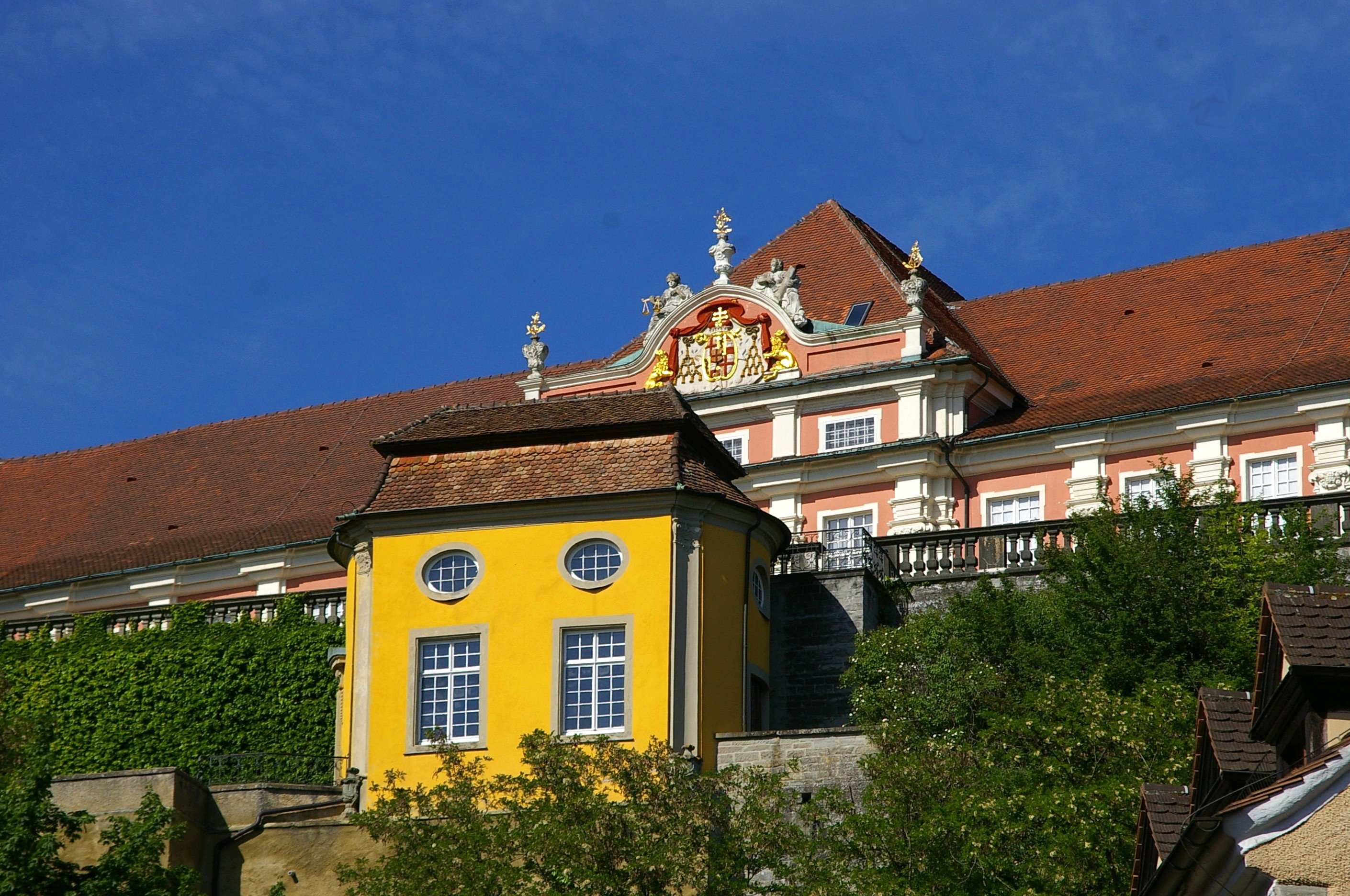 Meersburg - Neues Schloß mit Teehaus